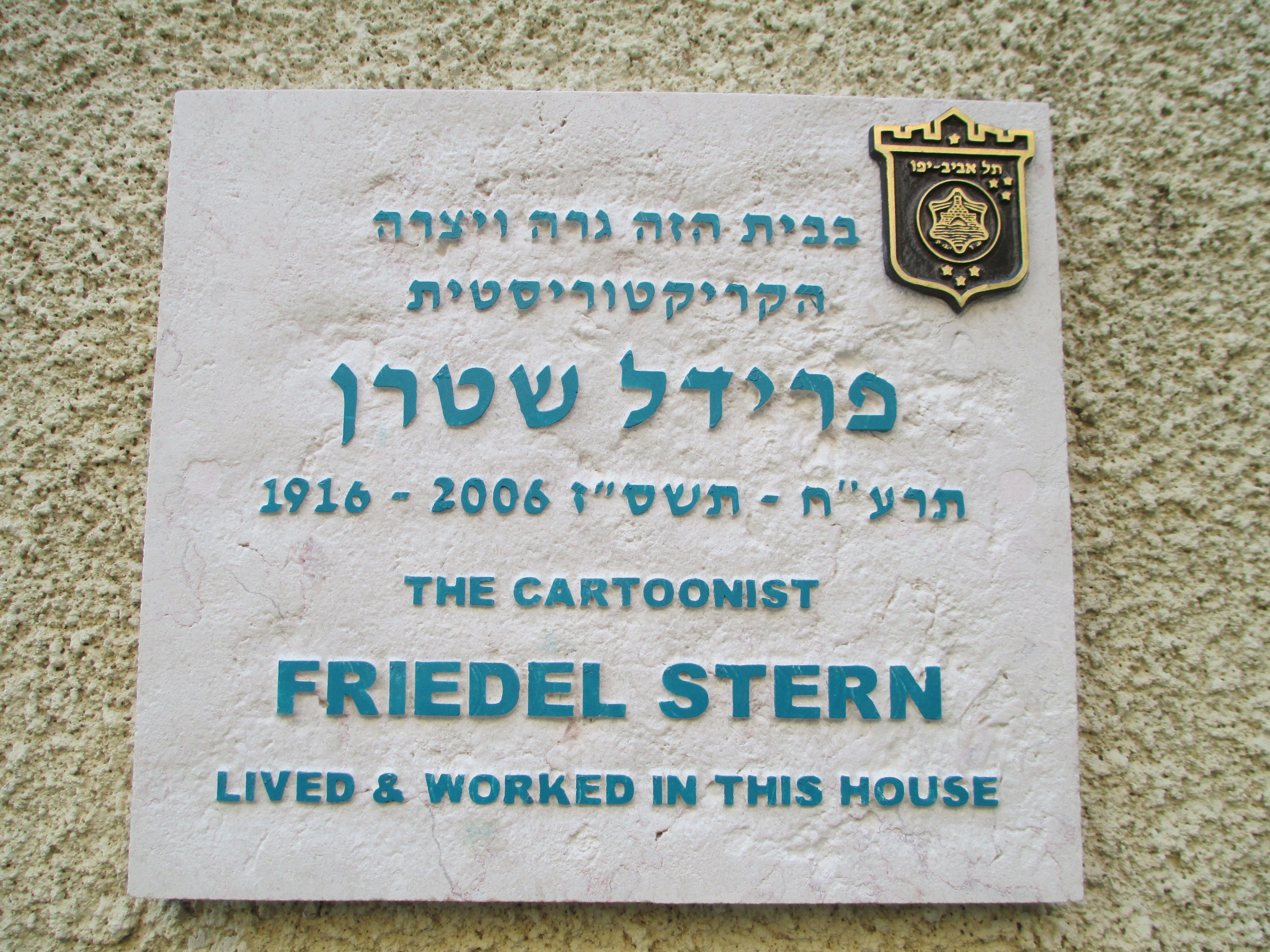 לוחית זיכרון לקריקטוריסטית פרידל שטרן בתל אביב